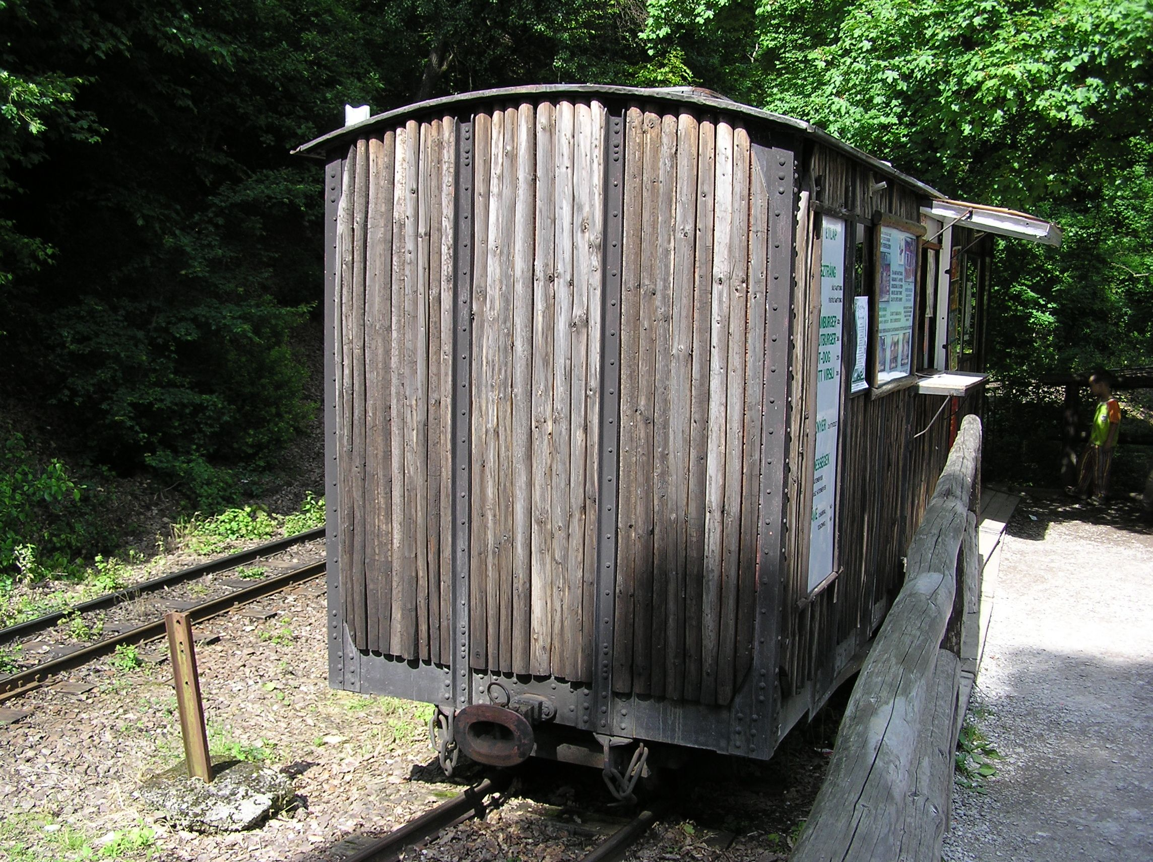 A Szilvásváradi Erdei Vasút tehervagonból átalakított büfékocsija K-03-212-es pályszámmal (Fotó: Birincsik József)